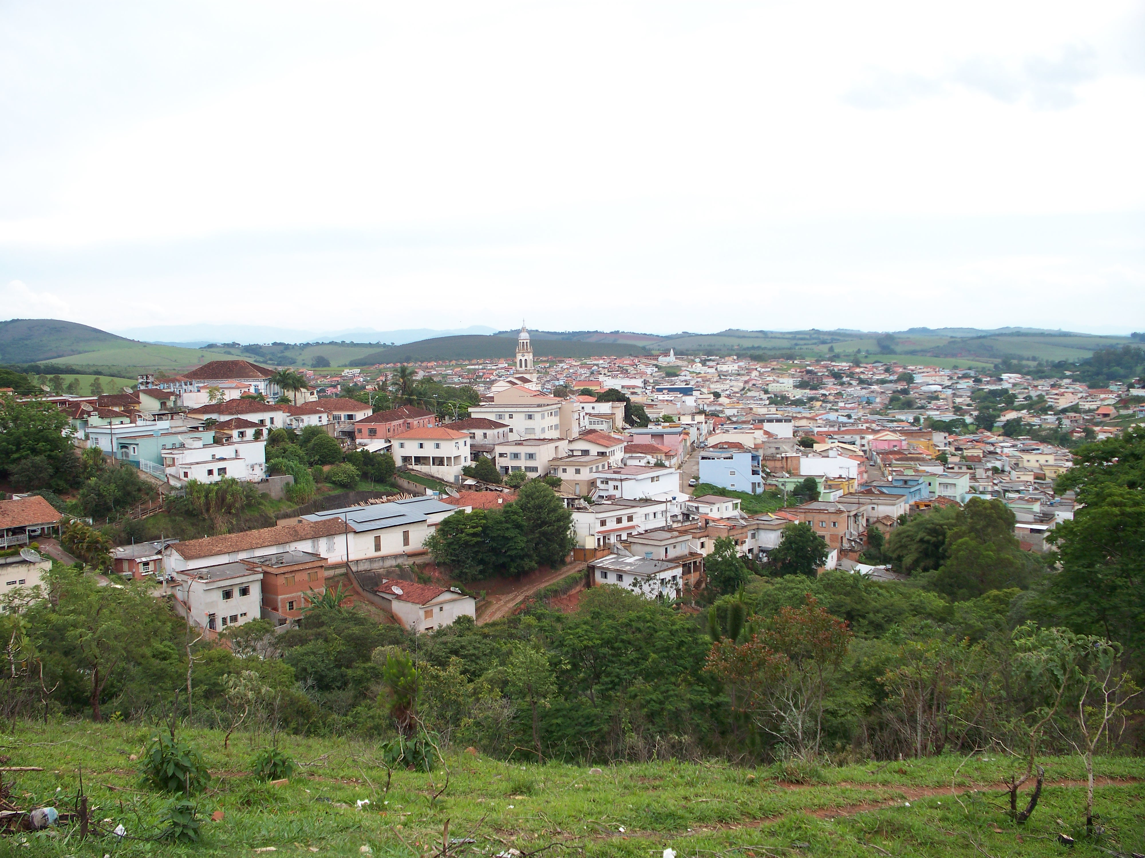 Vista parcial de Cruzília MG